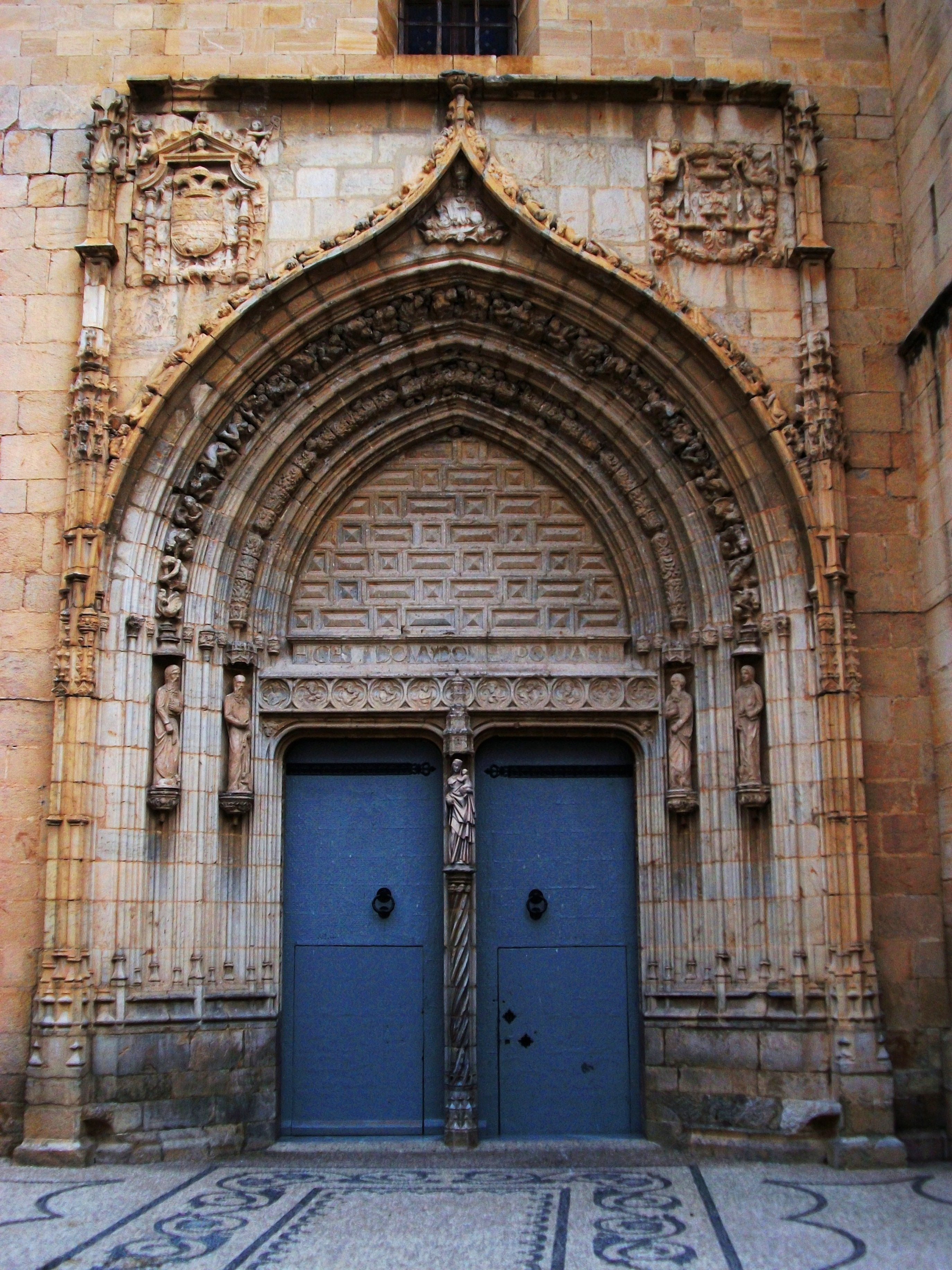 Portada de l'església arxiprestal de Sant Martí, Callosa de Segura, Baix Segura, País Valencià.